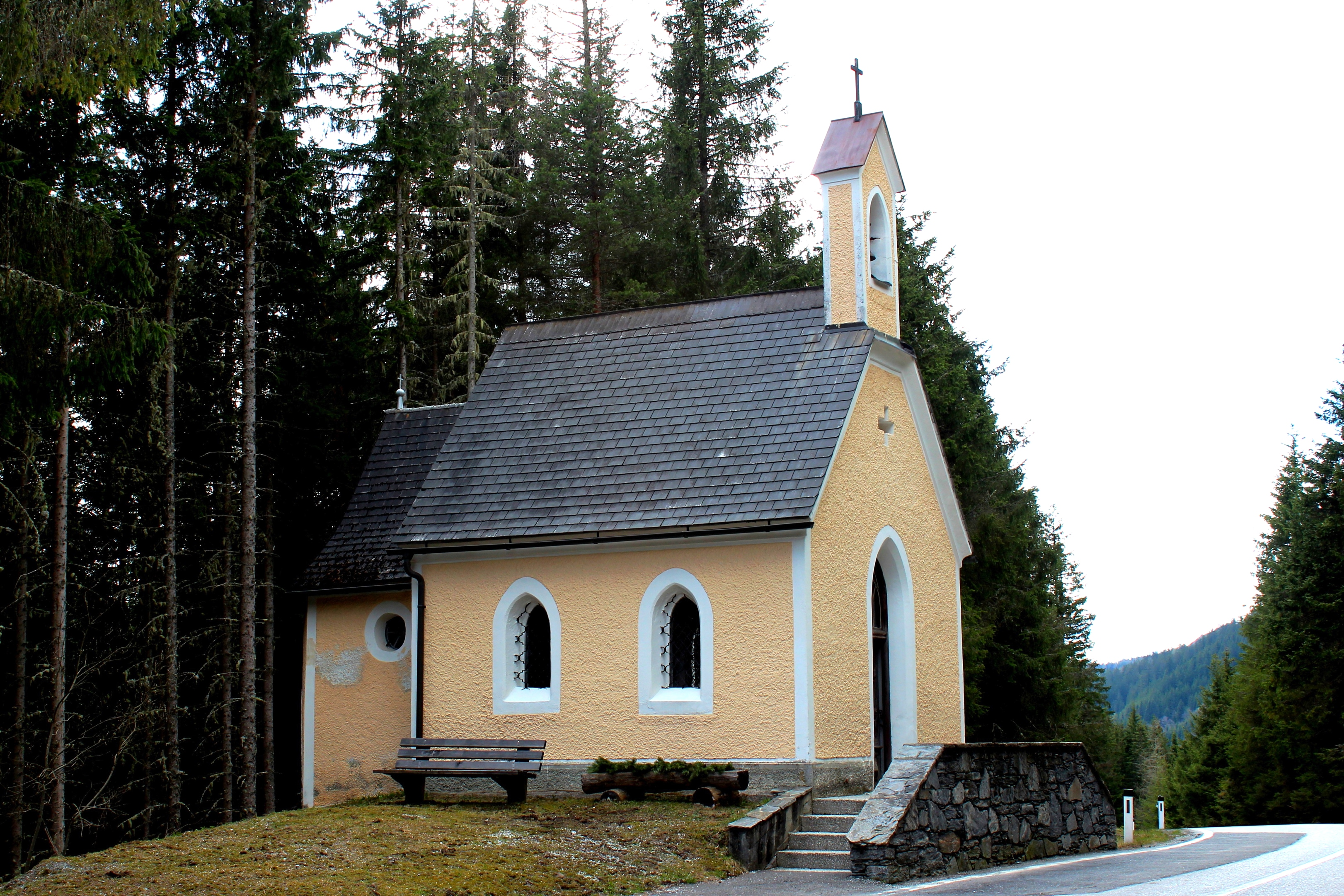 Kapelle Mariae Namen, Schwarzenbichlkapelle/Fellkapelle